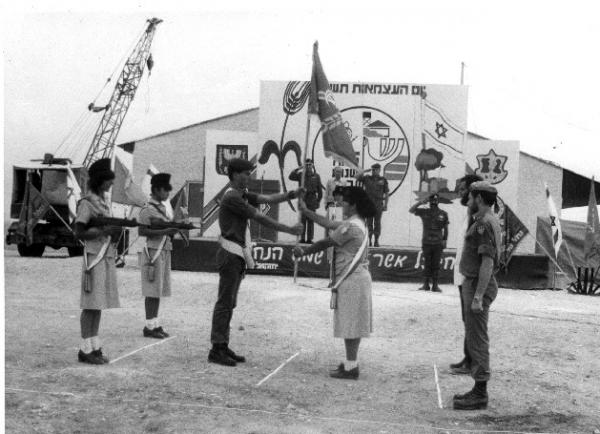 טקס אזרוח היאחזות נחל חריש 1982